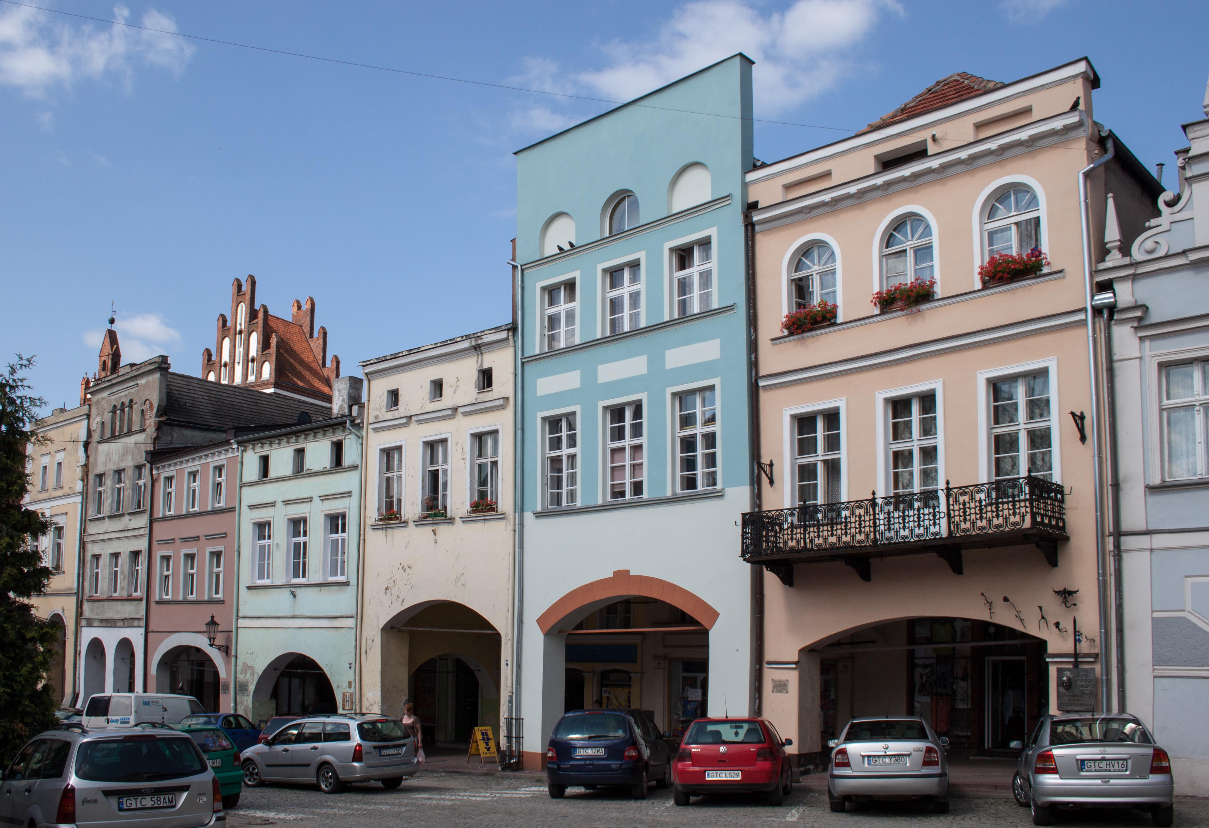 Plac Grunwaldzki, Gniew